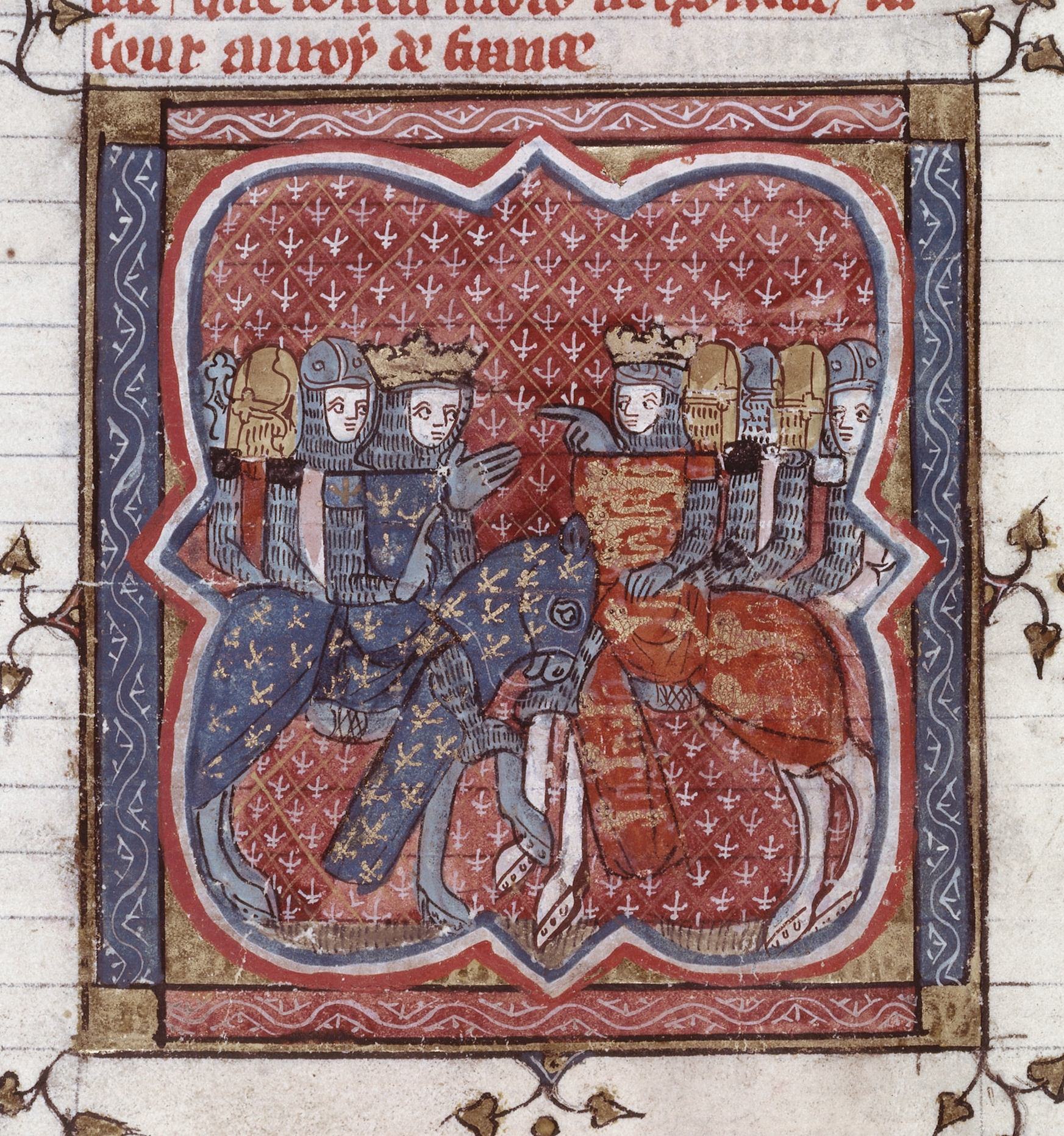 IIIe croisade : Rencontre de Philippe Auguste et Richard CÅ“ur de Lion Guillaume de Tyr, Les Histoires d'Outremer. Traduction et continuation jusqu'Ã l'an 1261. Manuscrit sur parchemin (336 feuillets, 33,5 x 23,5 cm). XIVe siÃ¨cle. Paris, 1330-1340. BnF, Manuscrits (Fr 24209 fol. 272v)